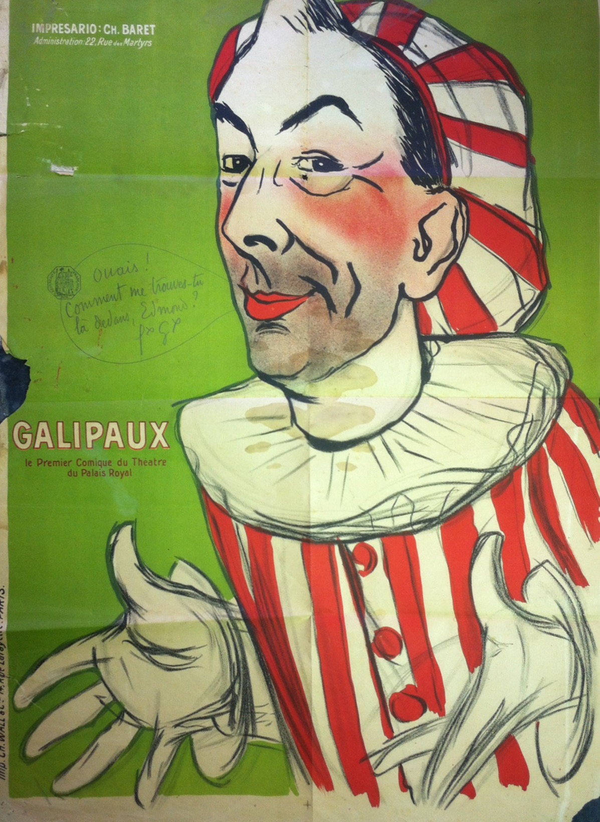 Affiche Félix Galipaux dédicacée à son ami Edmond Guiraud